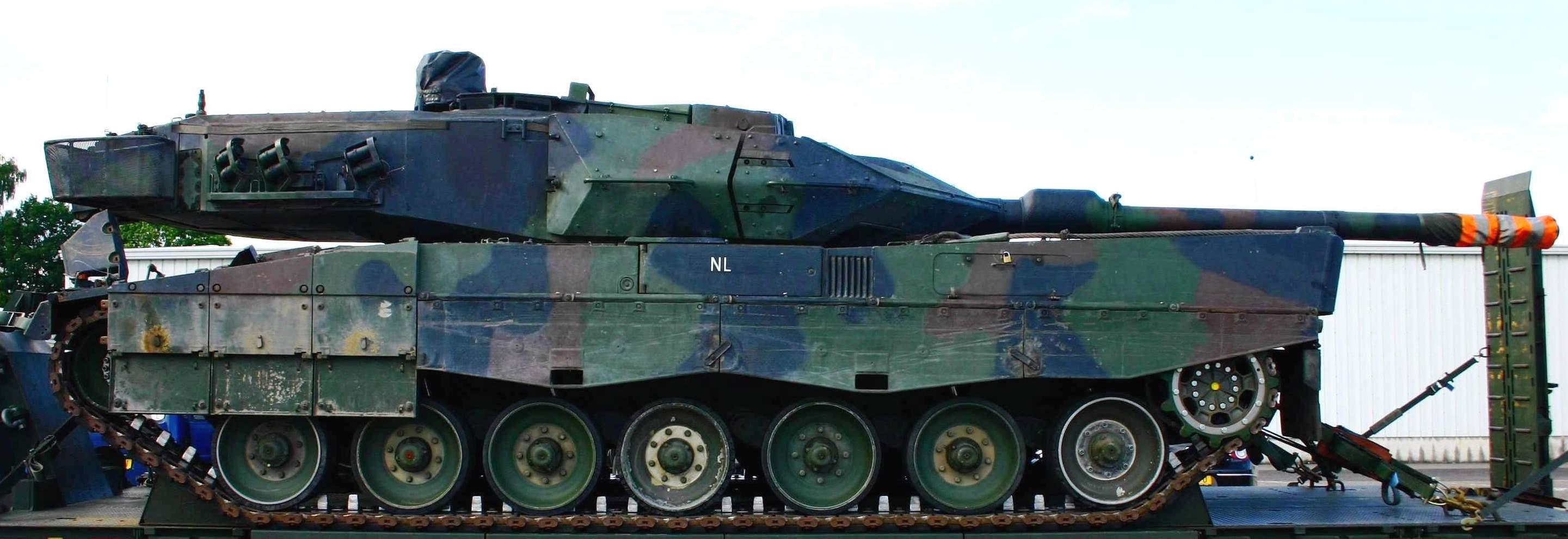 En hollännesche Leopard gesinn zu Beetebuerg 2008. Kategorie:Tanksen